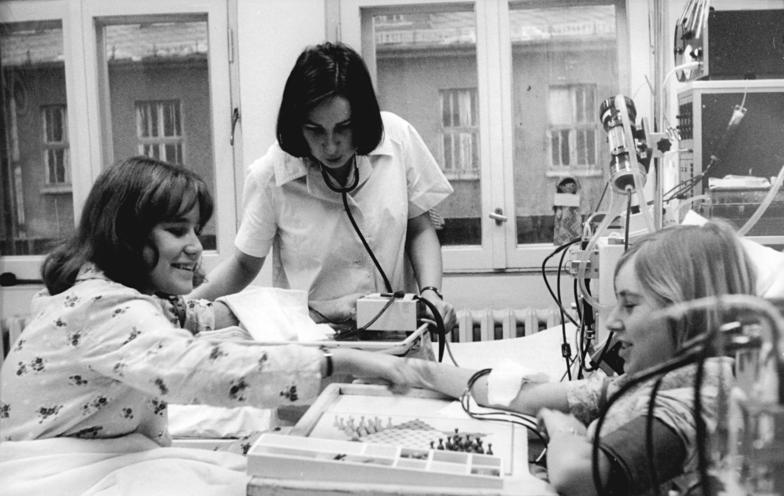 Berlin, Charité, Kinderdialysestation ADN-ZB DDR 26.1.1977 cu Große Hilfe für kleine Patienten - erste Kinderdialysestation. Eine Dialysestation für Kinder wurde an der Charité (Universitätsklinikum) Berlin eröffnet. Zehn kleine Patienten - das sind alle Kinder der DDR mit einer im Endstadium stehenden Niereninsuffizienz - werden hier regelmäßig dialysiert. Aber auch die anderen 54 Kinder, die an chronischem Nierenversagen leiden, sind hier als mögliche Dialysepatienten bekannt. Noch kommen diese mit Diät und anderen Behandlungsmethoden aus. - Vier Ärzte und acht Schwestern sorgen sich Hand in Hand mit Pädagogen und Psychologen um die jungen Patienten, die mehrmals wöchentlich an die künstliche Niere angeschlossen werden müssen. Auch die Freizeitgestaltung wird großgeschrieben. Das Leben dieser Kinder, die in der Regel jeweils bis zum Wochenende auf der Station bleiben müssen, soll möglichst normal verlaufen. Sie alle werden auf eine Nierentransplantation vorbereitet, die sie von dem künstlichen Organ unabhängig macht. Foto: Während der Blutwäsche unterhalten sich Ute (l.) und Irina (r.) mit einem Gesellschaftsspiel. Im Unterricht, der auch auf der Station weitergeführt wird, sind beide gute Schülerinnen. Ute möchte später Chemielaborantin, Irina Fachverkäuferin werden. Reporter: Junge Copyright: ADN-Zentralbild